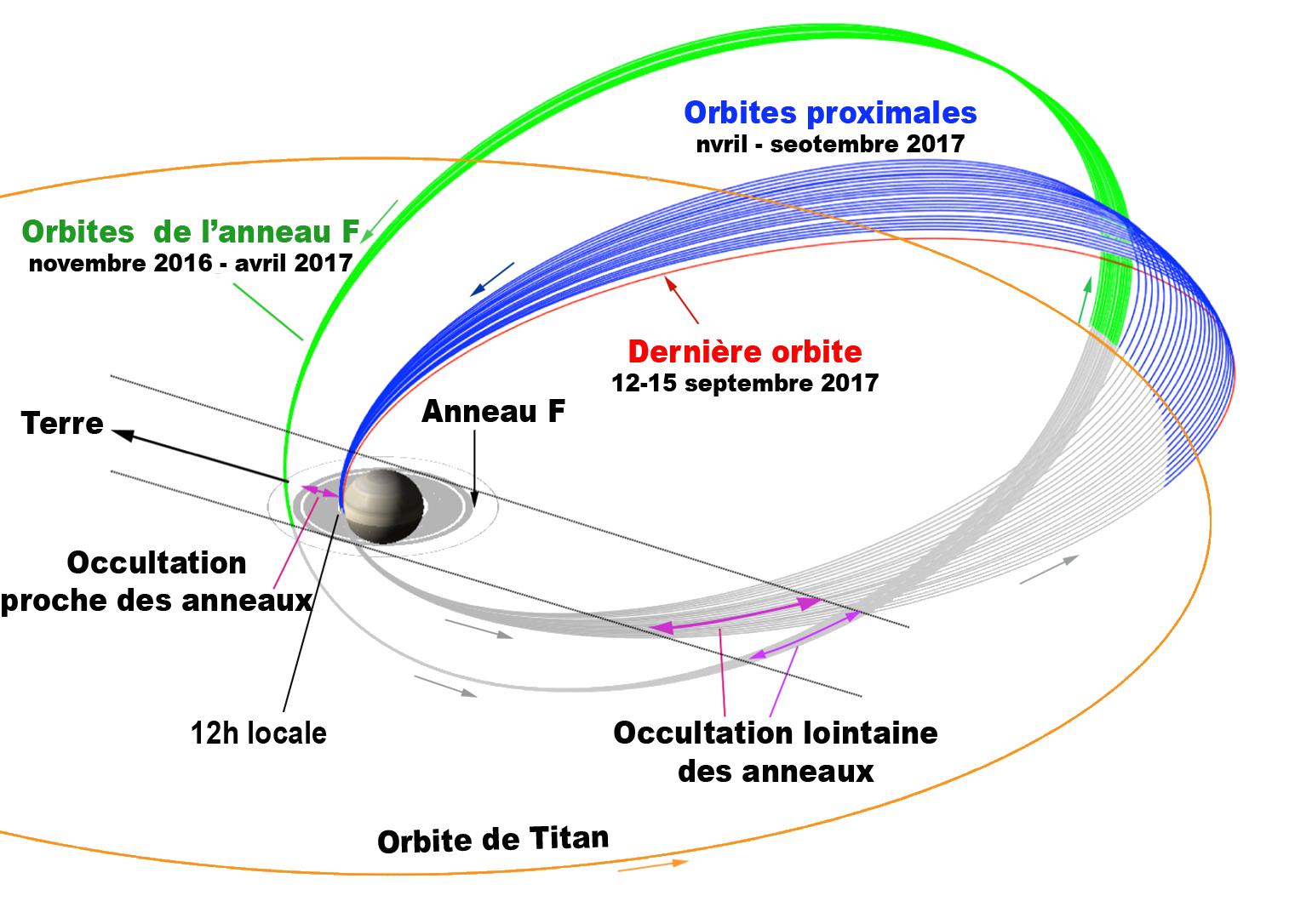 Orbites décrites par la sonde spatiale Cassini durant la phase finale de sa mission (légendes en francais)